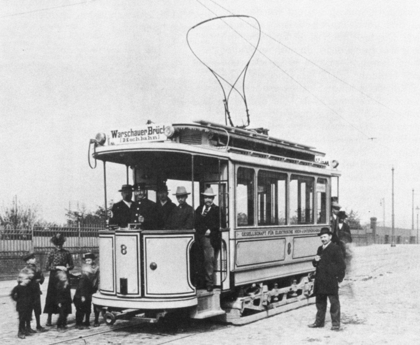 Wagen Nr. 8 der Flachbahn der Hochbahngesellschaft Berlin